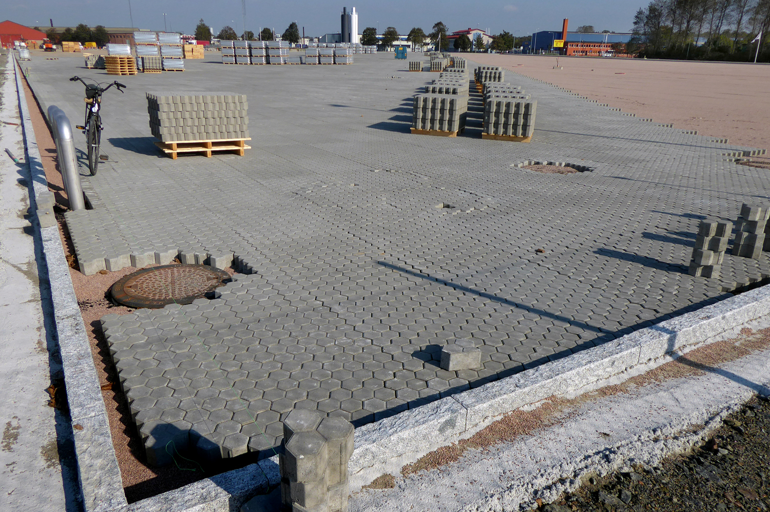 Stensättning av en större parkeringsplats för långtradare vid Revhusen i Ystad 1 okt 2017.